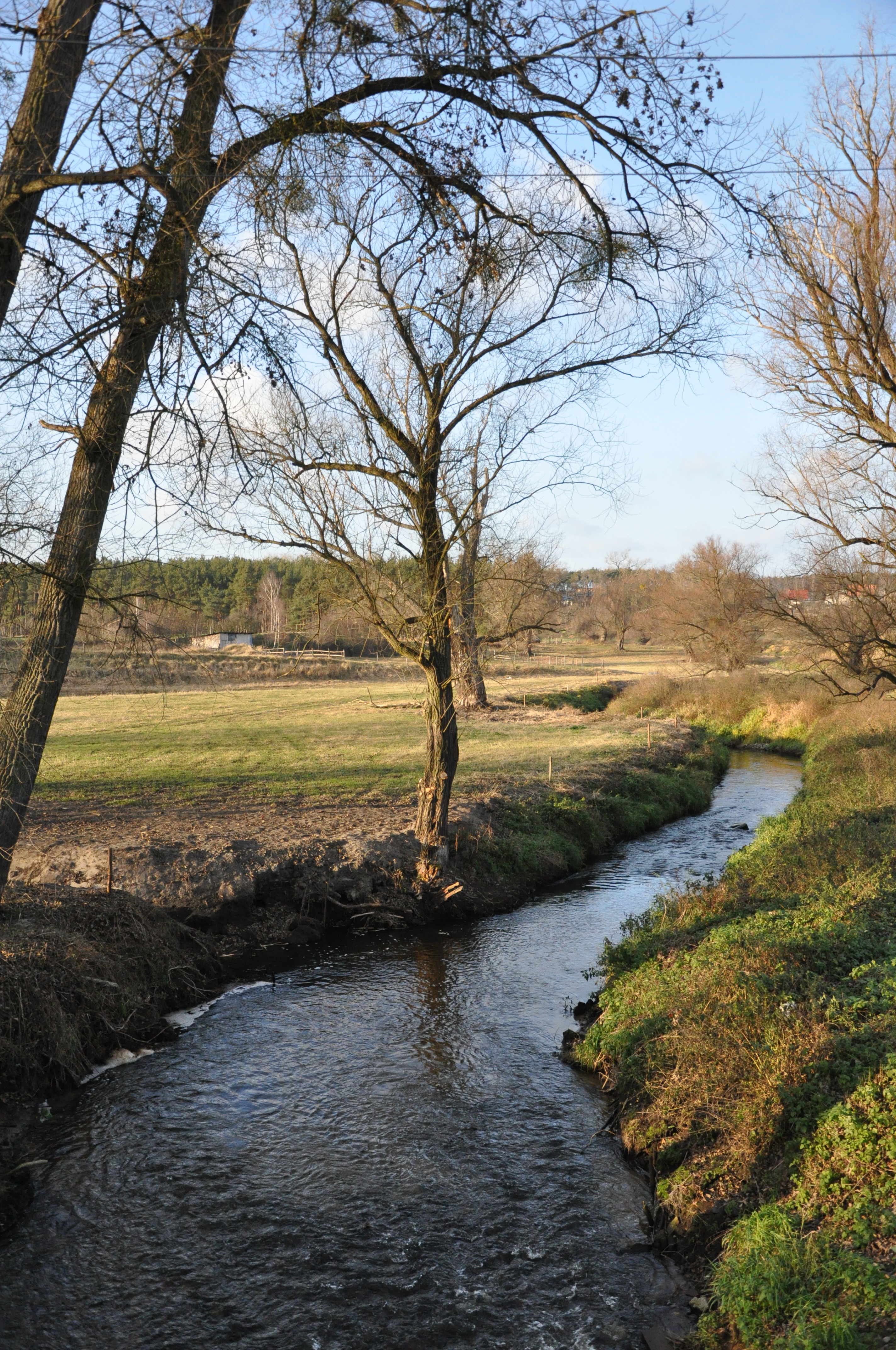 Rzeka Sama w Obrzycku, niedaleko swojego ujścia do Warty